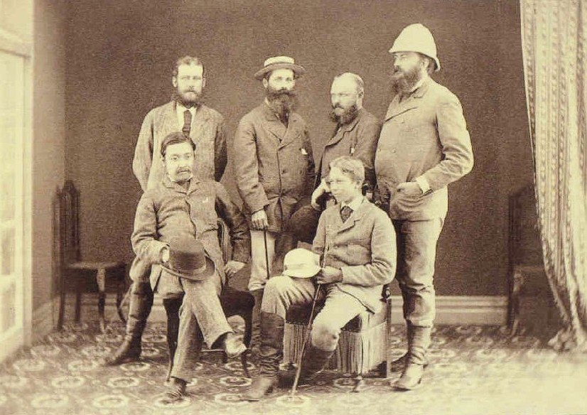 Prinz Albert Wilhelm Heinrich von Preußen (* 14. August 1862 in Potsdam; † 20. April 1929 in Hemmelmark, Schleswig-Holstein) war Großadmiral der Kaiserlichen Marine und Bruder Kaiser Wilhelms II. Whrend seiner Japanreise